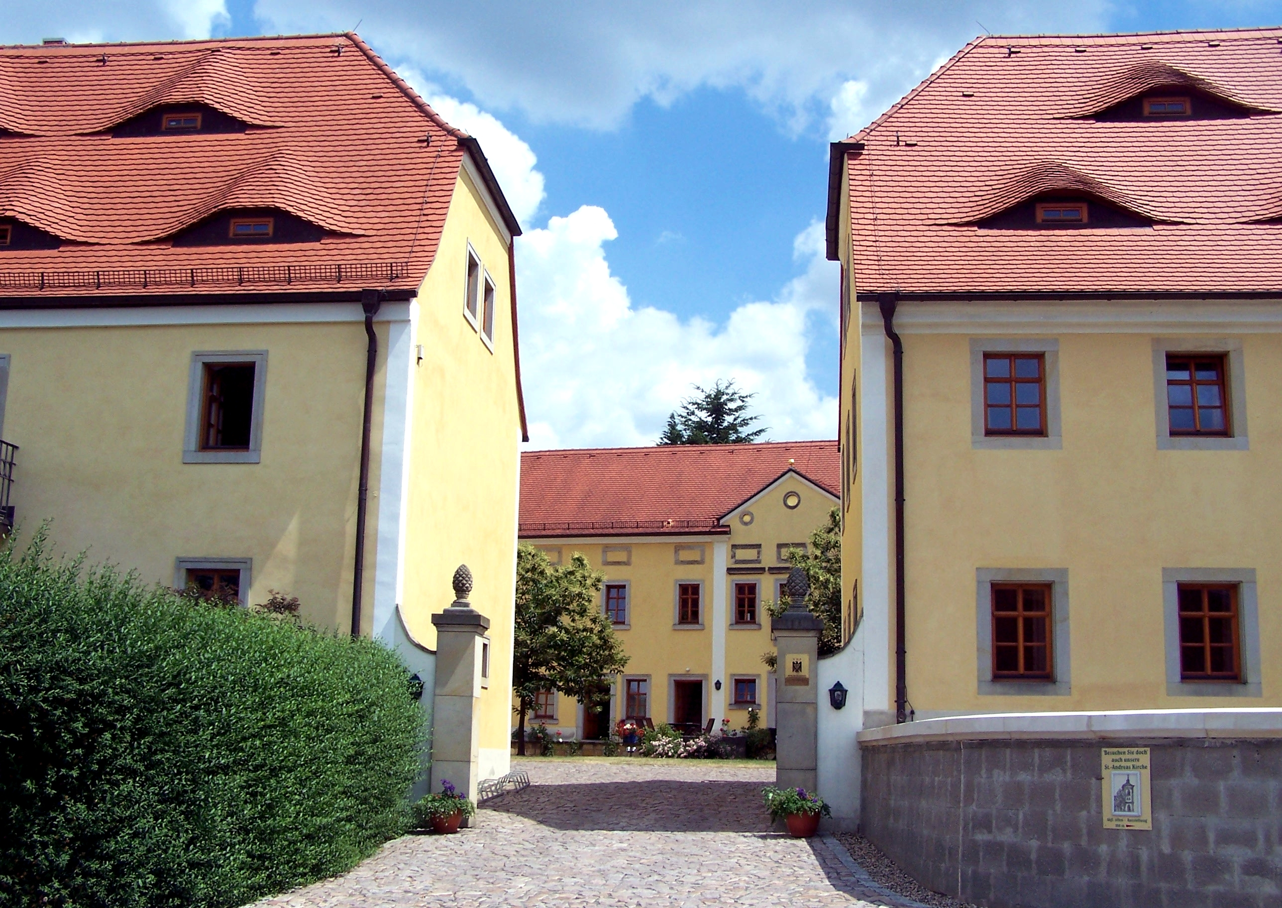 Einfahrt zum Weingut von Schloss Proschwitz in Zadel. Das Schloss selbst liegt einige Kilometer entfernt.